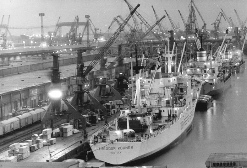 Rostock, Überseehafen, Stückgutkai, Verladearbeiten, Nacht ADN-ZB Sindermann 28.12.87 Rostock: Im Überseehafen Rostock wird - wie hier am Stückgutkai bei Nacht - im Jahresendverkehr mehr Ware als gewöhnlich umgeschlagen. Auch über die Weihnachtstage und zum Jahreswechsel wurde und wird gearbeitet. Zu den Kooperationspartnern der Kollektive im größten DDR-Seeumschlagplatz gehören DEUTRANS und die Hafenbahn. (siehe 14 und 15 N und ADN-Meldung am Jahresende)